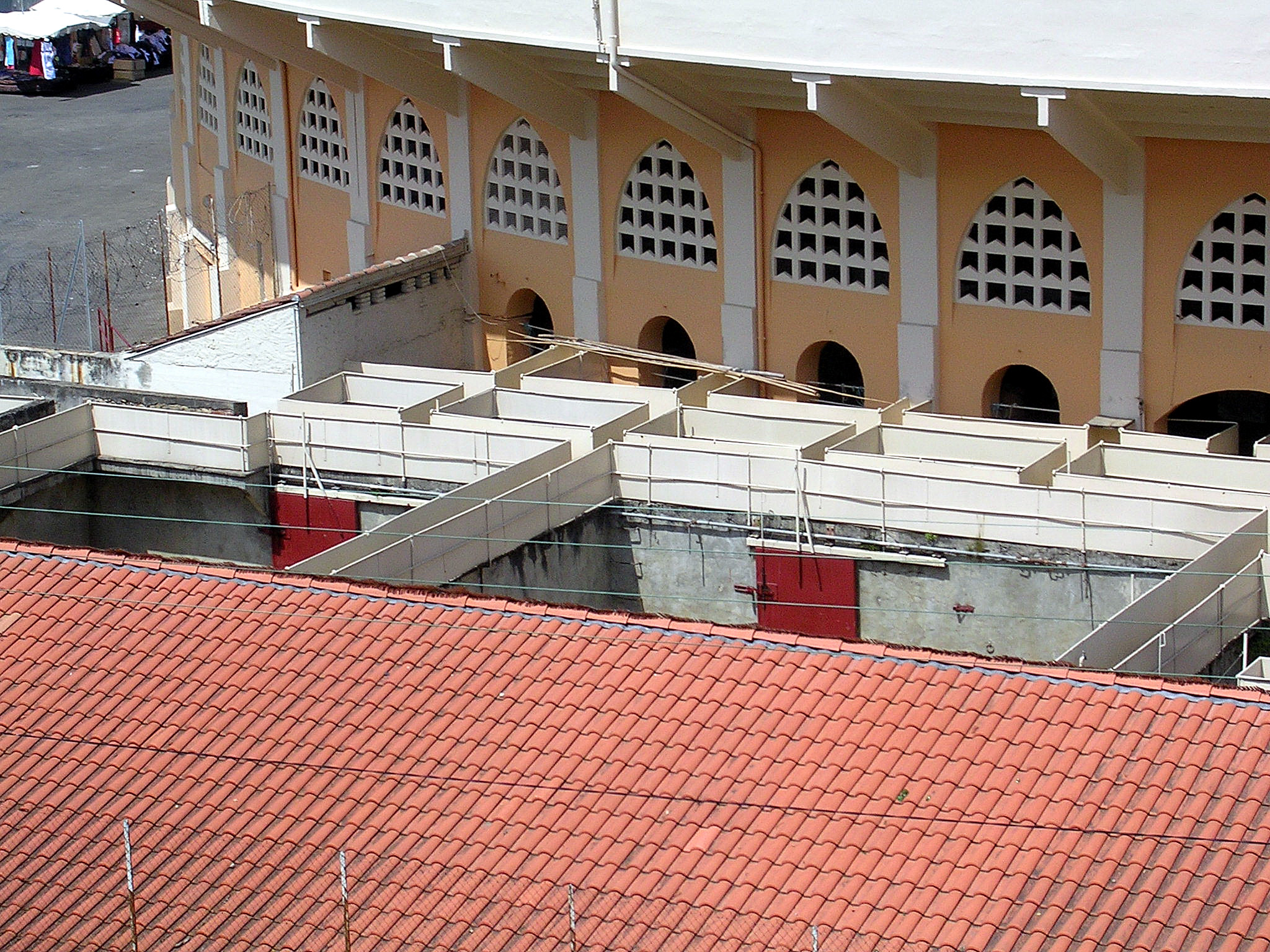 Toril à l'arrière des arènes du Plumaçon à Mont-de-Marsan (Landes, France).